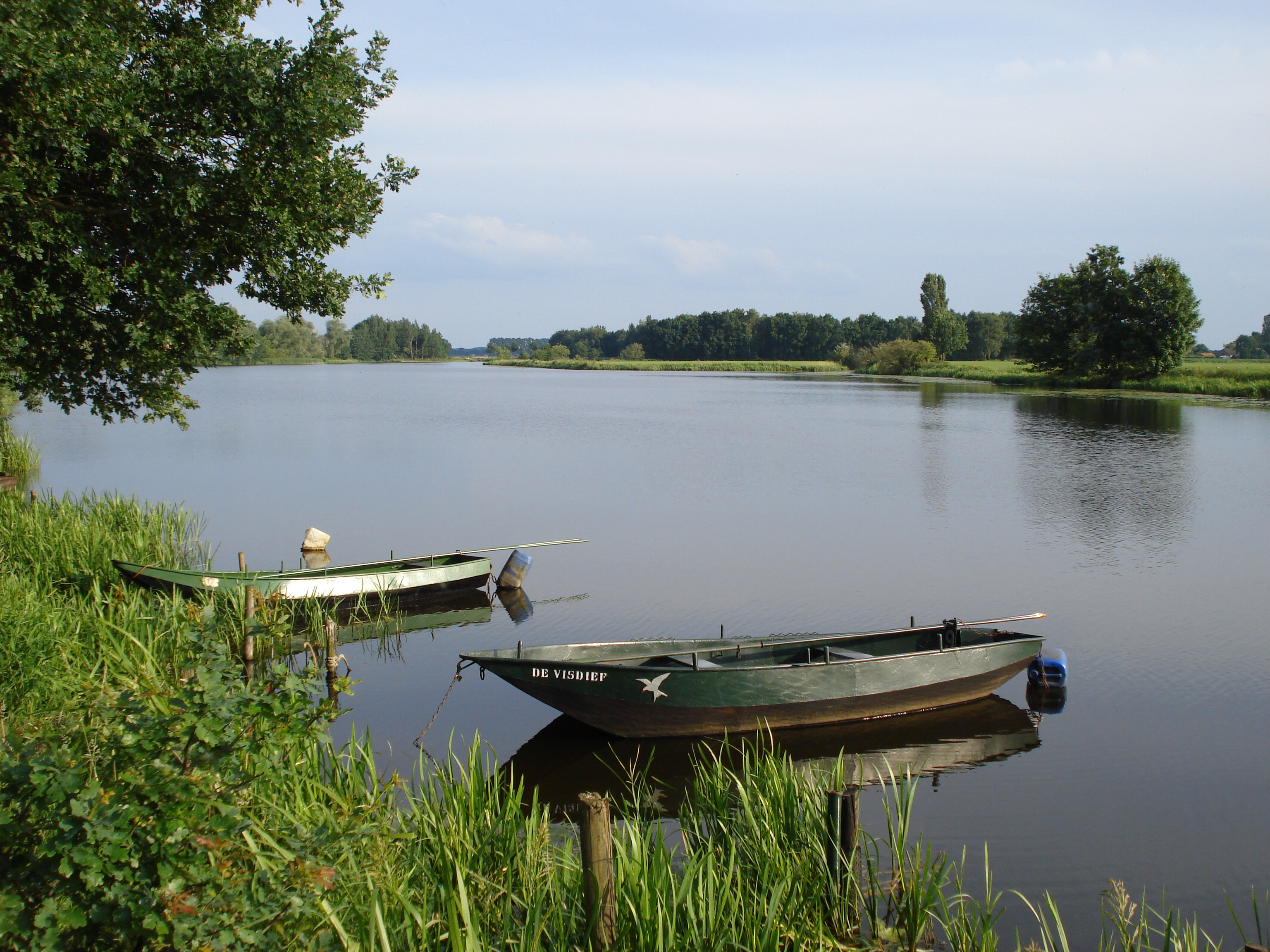 Hertogswetering, la section Hamerspoel